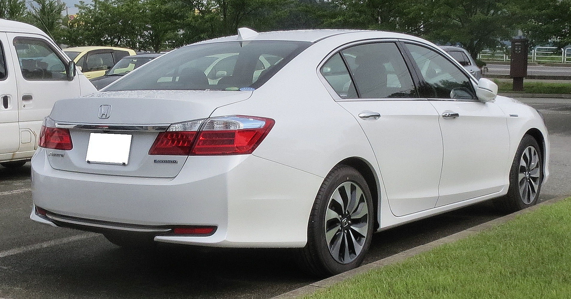 ホンダ・アコードハイブリッド